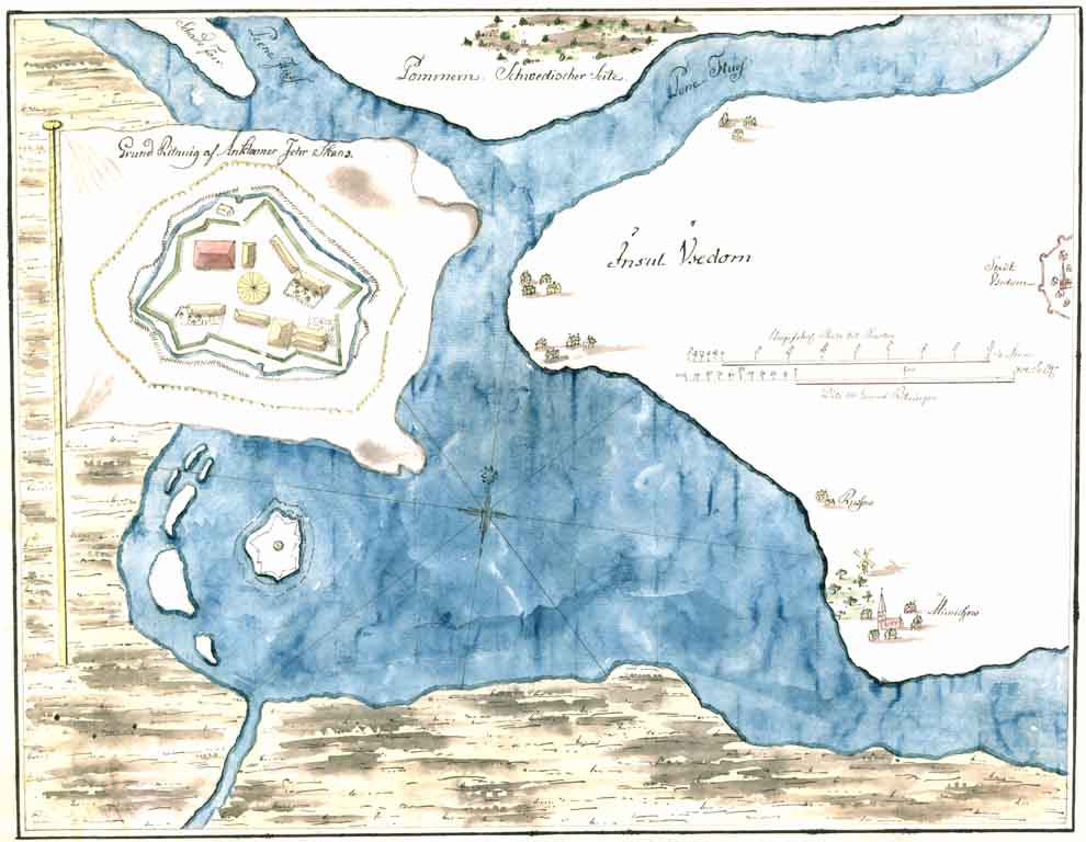 Citymap of Anklamer Fähre im 17. Jahrhundert